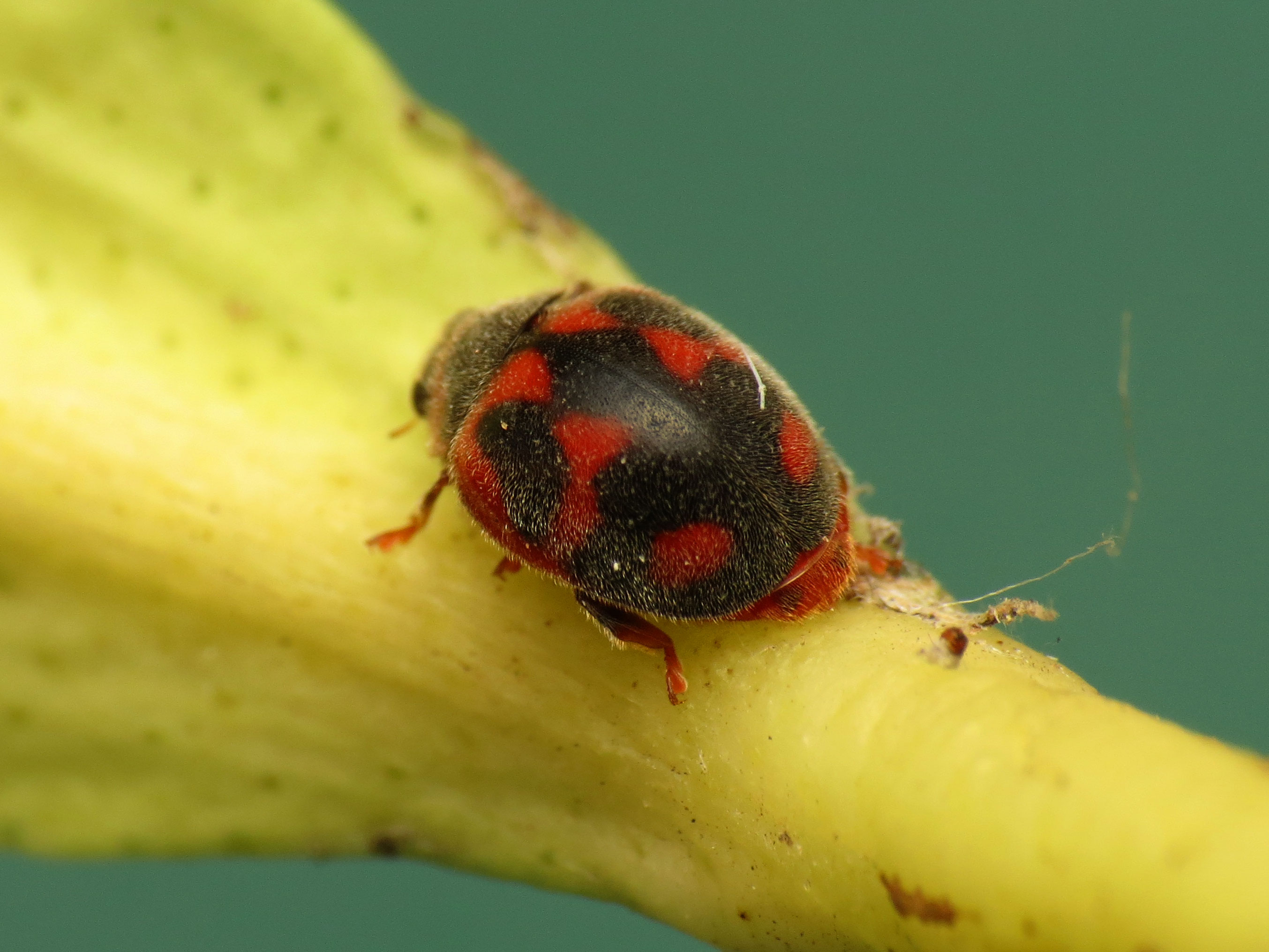 Rodolia cardinalis. Els Poblets, Alicante, Spain